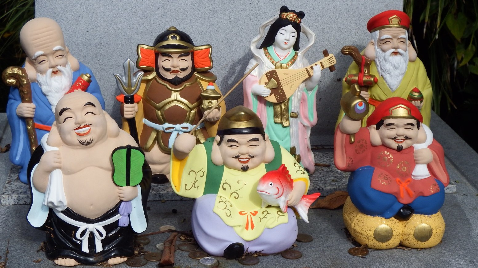 大宝寺の七福神